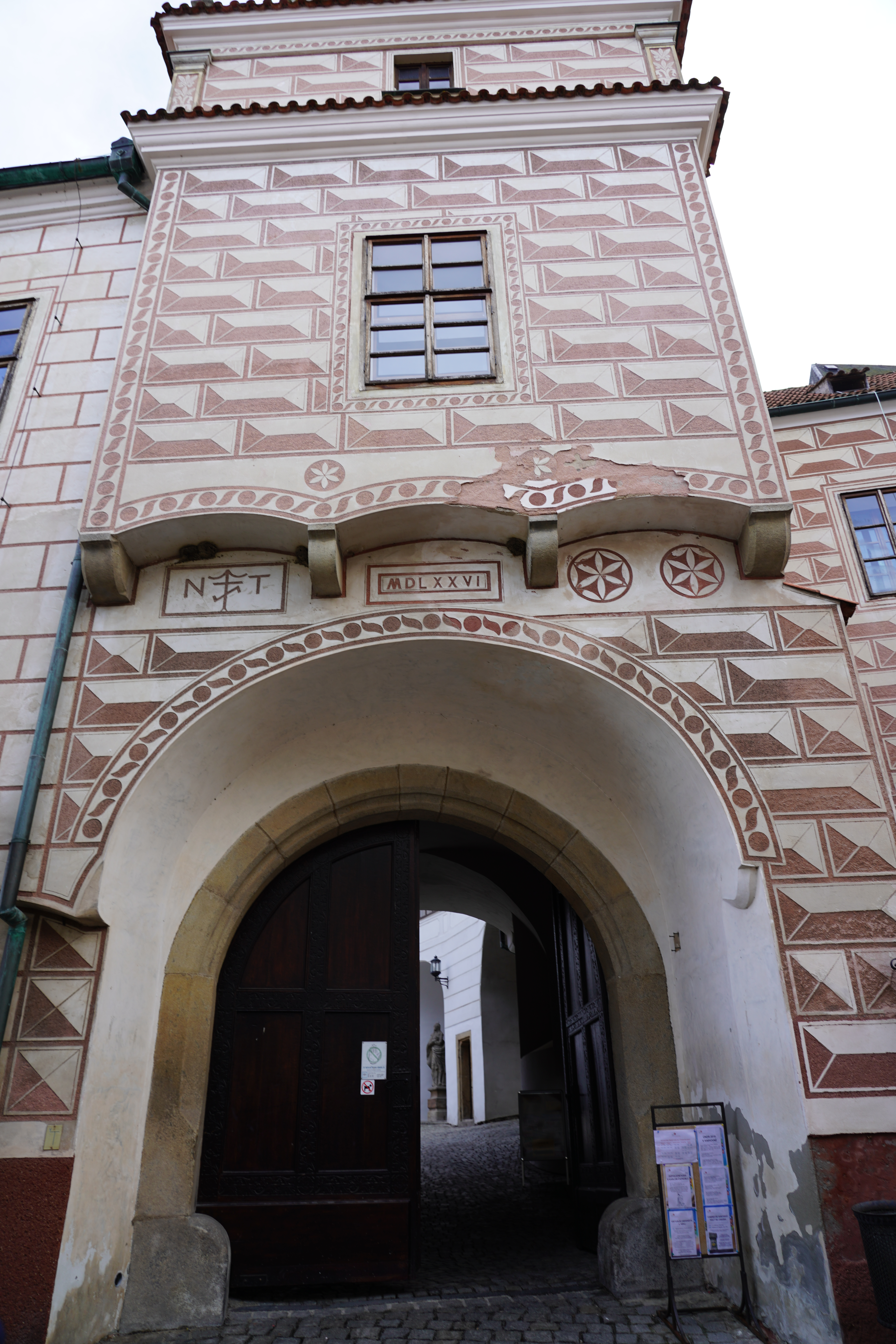 Český-Krumlov 契斯基-庫倫隆 Krumlov 庫倫洛夫